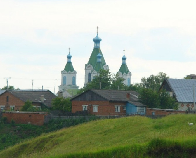 Вид на село Пичаево, Пичаевский район Тамбовской области, Россия